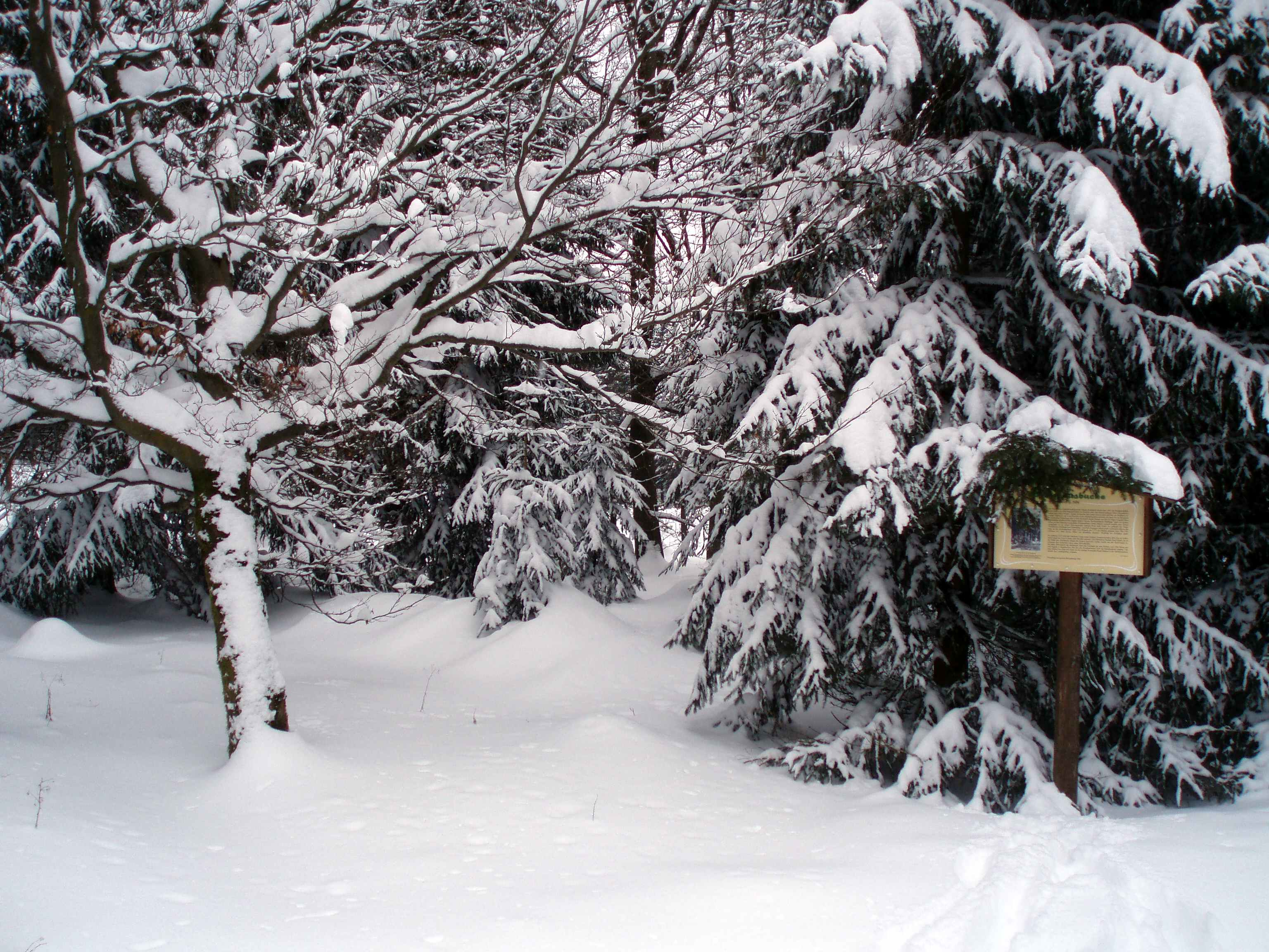 Preißhausbuche mit Erläuterungstafel